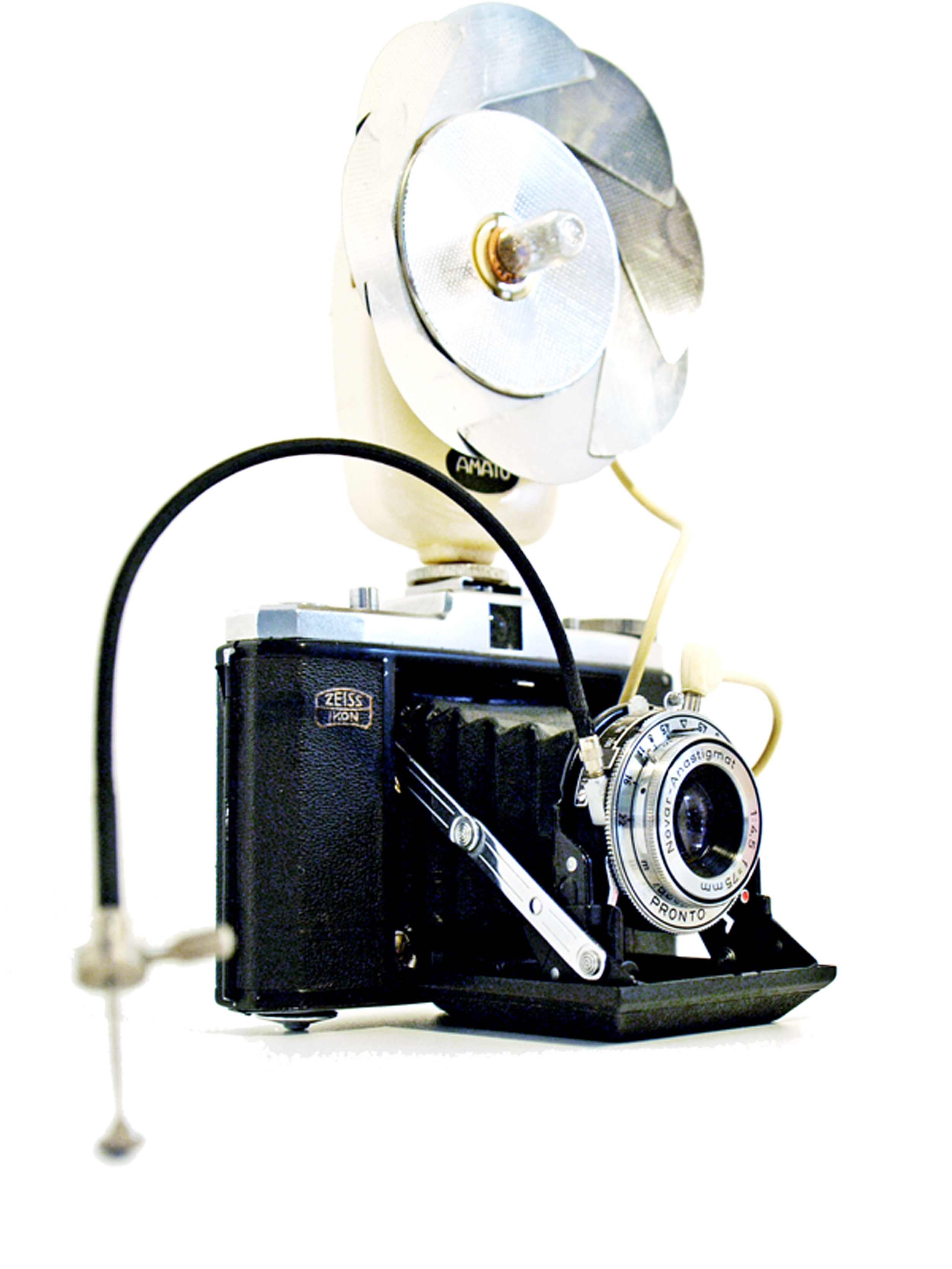 Zeiss Ikon camera met flitser